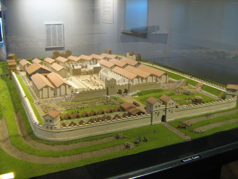 Modell des Arbeia Roman Fort, South Shields, in Ausstellung auf dem Gelände des Kastells, 2011